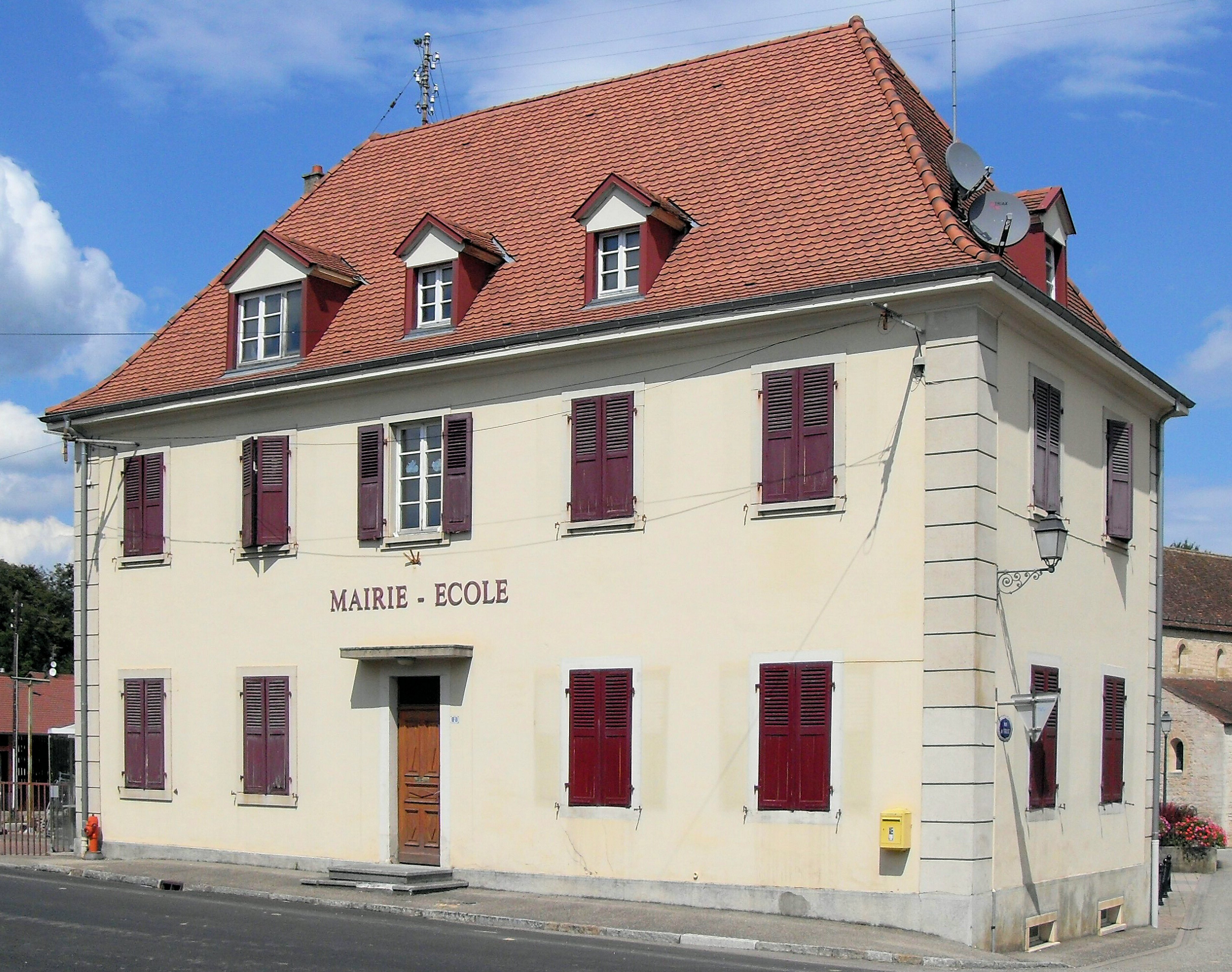 La mairie-école de Feldbach